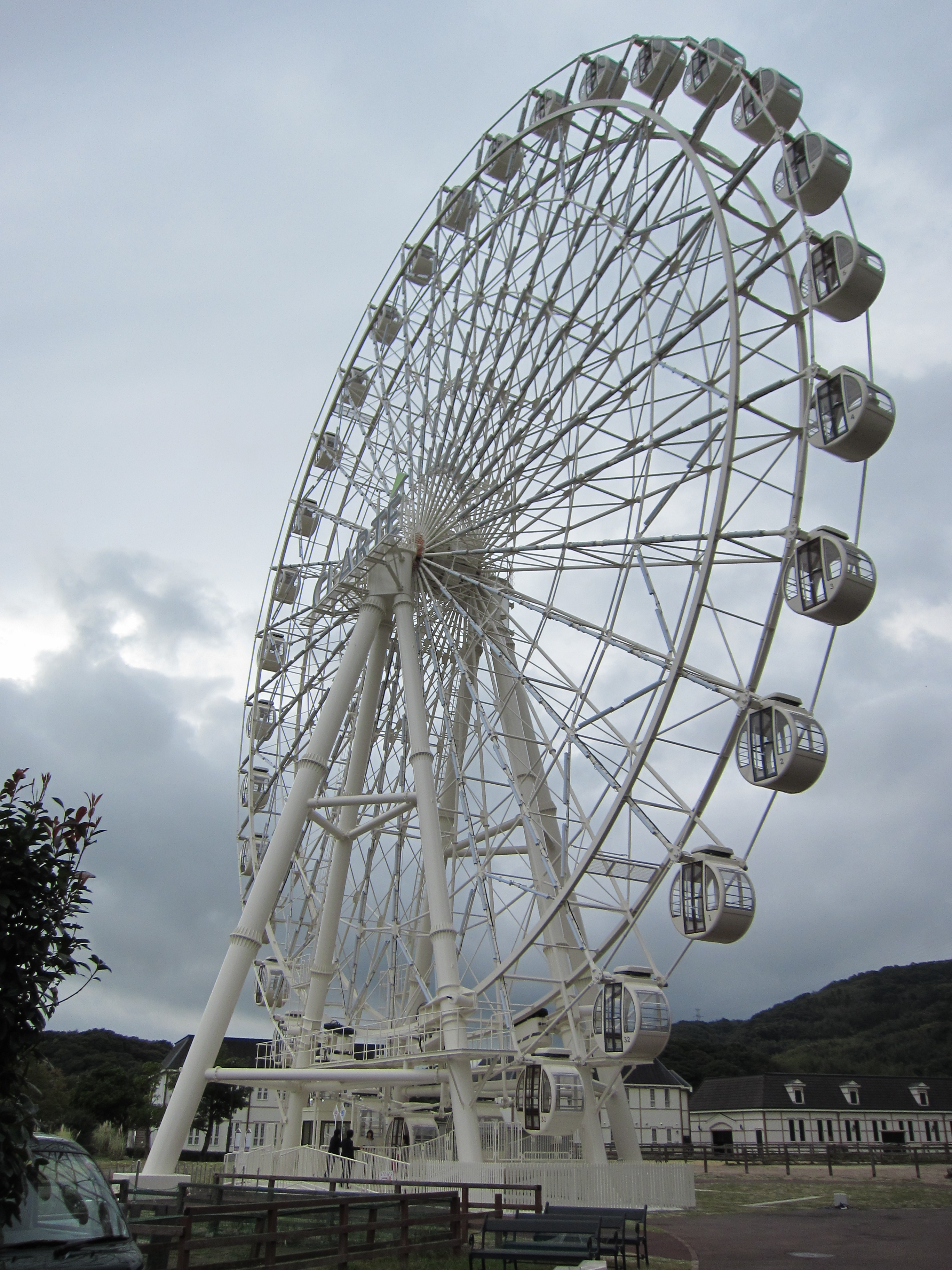 2011年11月25日に正式オープンした「白い観覧車」です。